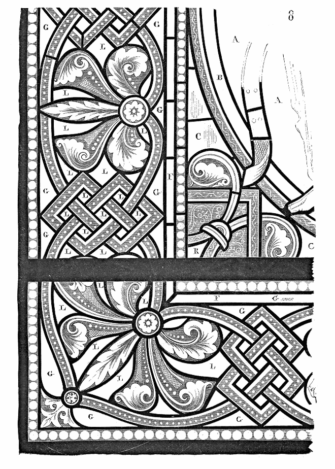 ... Autour se développe une bordure splendide comme composition et éclat, dont nous donnons (fig. 8) le détail au sixième de l'exécution. En A, sont les fonds rouges des prophètes; en B, le filet bleu qui rappelle le ton du fond du Jessé, puis le liséré blanc ondé, enlevé au style sur un ton bistré apposé sur le verre; en C, le fond vert des écoinçons. Ceux-ci sont chargés d'un carré bleu bistré de peinture, avec des détails extrêmement délicats enlevés au style, conformément à la méthode indiquée par Théophile. Ces carrés bleus sont coupés par des ornements pourpre chaud qui mordent sur le fond vert. Un liséré blanc, également bistré et enlevé, entoure le carré bleu. Le rouge apparaît de nouveau en R. Un perlé jaune fait le bord intérieur de la bordure; il est doublé d'un filet bleu F, du même ton que le fond du Jessé. Le rouge réapparaît en G, et le bleu du fond du Jessé en L ...